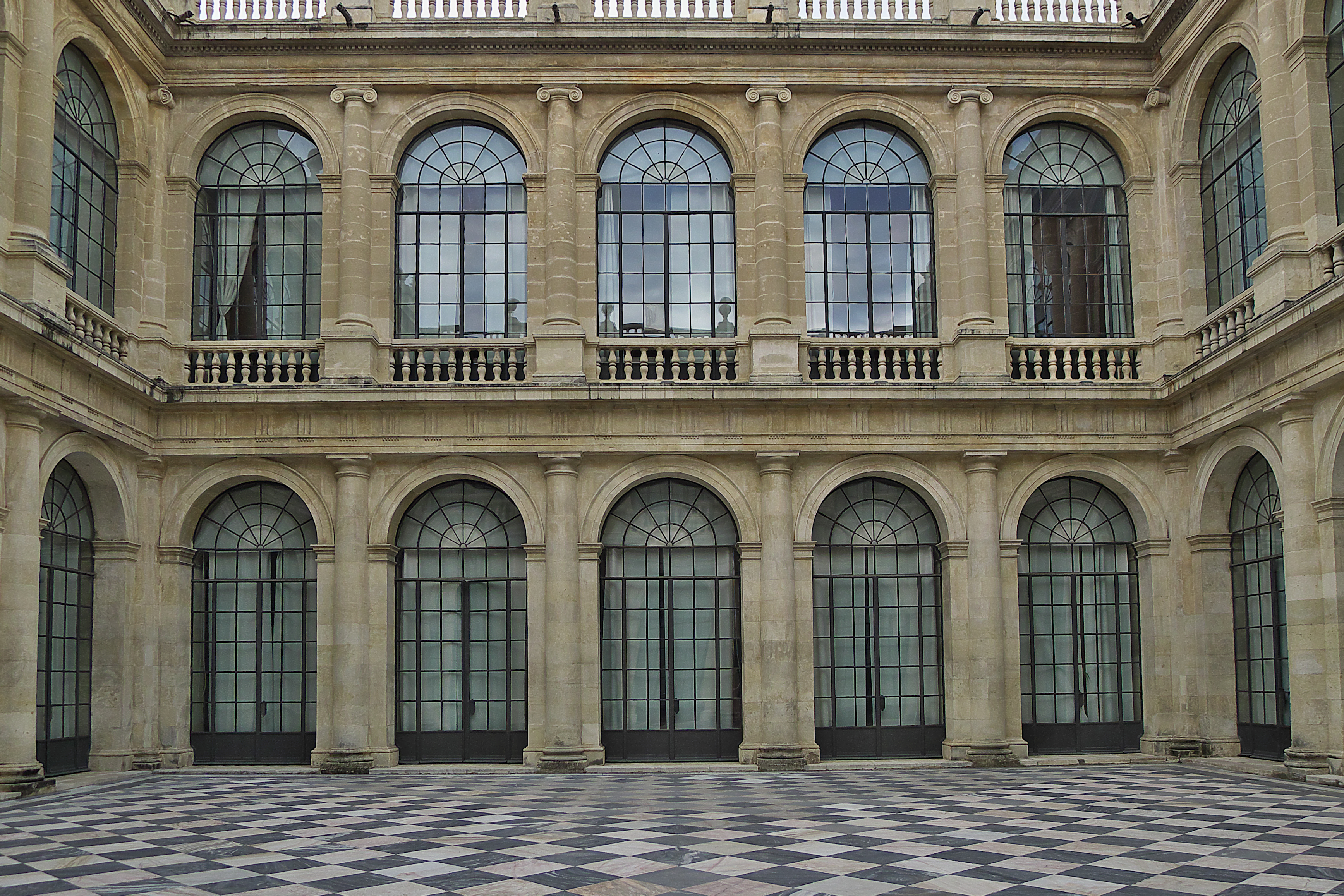 Juan de Minjares ejecuta el proyecto de Juan de Herrera (1583). Se terminaría hacia 1654, siendo Alonso de Vandelvira, aparejador y maestro mayor (ca. 1599-1604) uno de los principales artífice